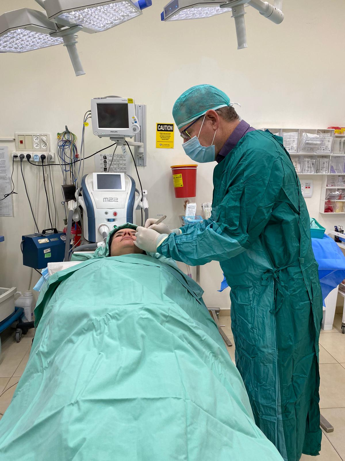 יהודה אולמן מנתח